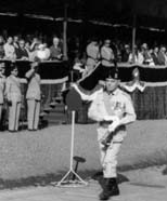 Adriano Magi Braschi durante una sfilata del 1969 alla Scuola di Artiglieria di Bracciano (Roma)